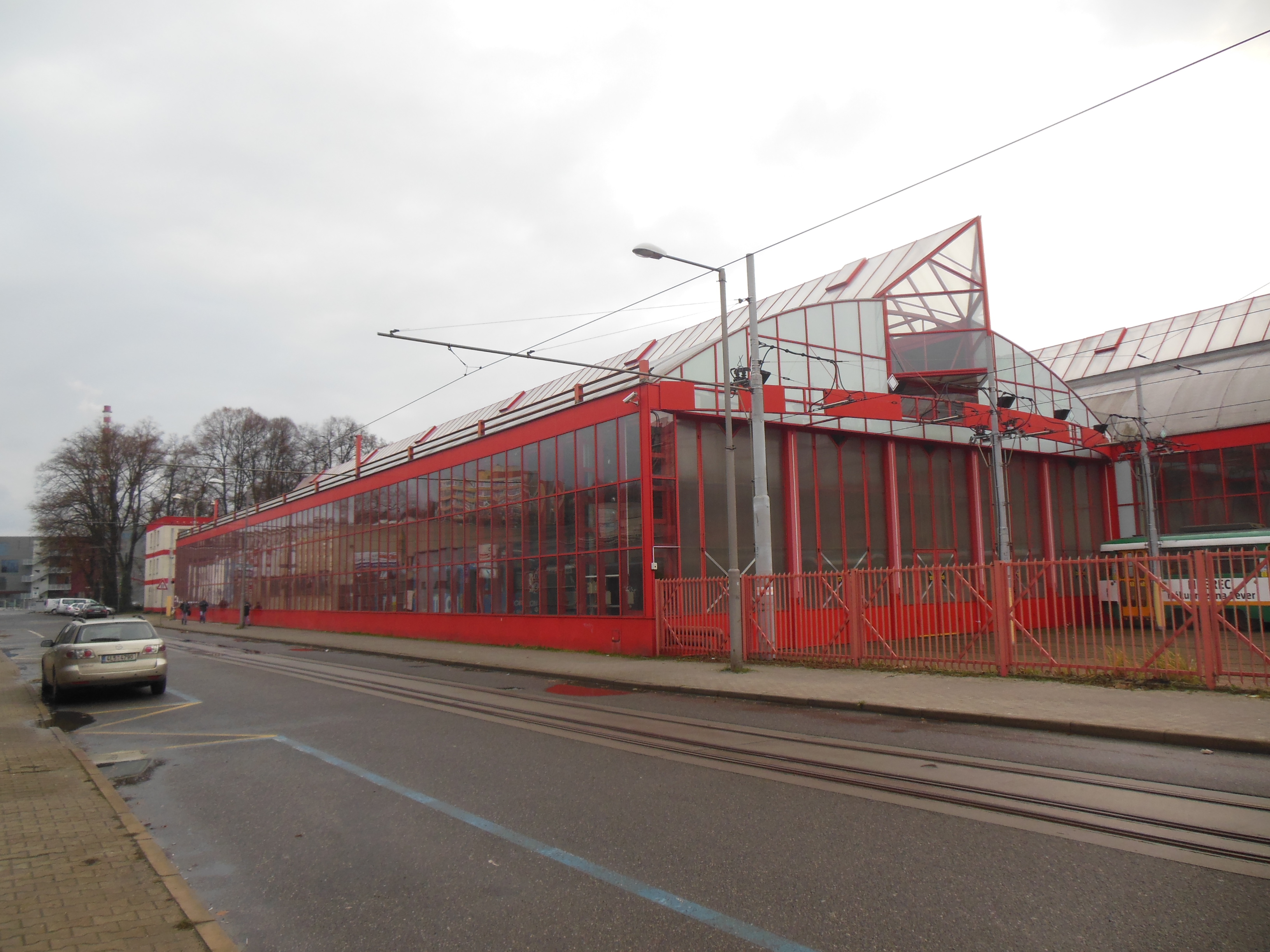 Liberec (okres Liberec). Ulice Mrštíkova, vozovna DPMLJ.